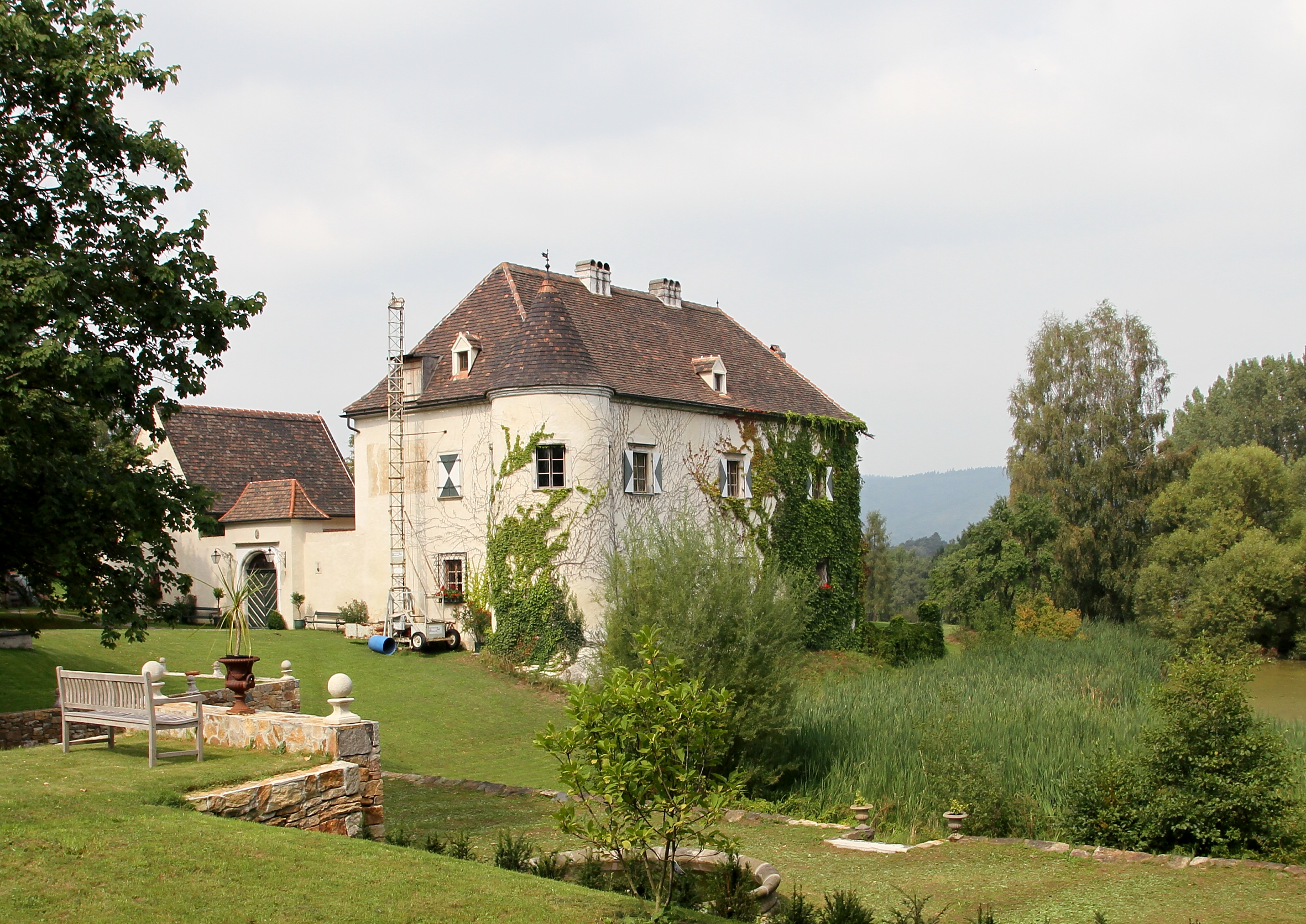 Schloss Grabenhof in Gansbach, ein Ortsteil der niederösterreichischen Gemeinde Dunkelsteinerwald. Ein zweigeschossiger Bau mit Kernsubstanz aus dem 15./16. Jahrhundert. Ab 1490 als "Grabenhof" bezeichnet mit häufig wechslende Besitzer; seit 1969 in Privatbesitz.